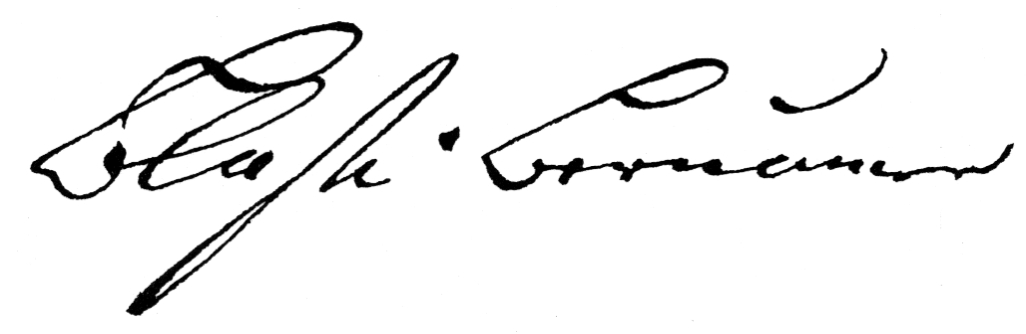 Unterschrift des Orgelbauers Blasius Bernauer